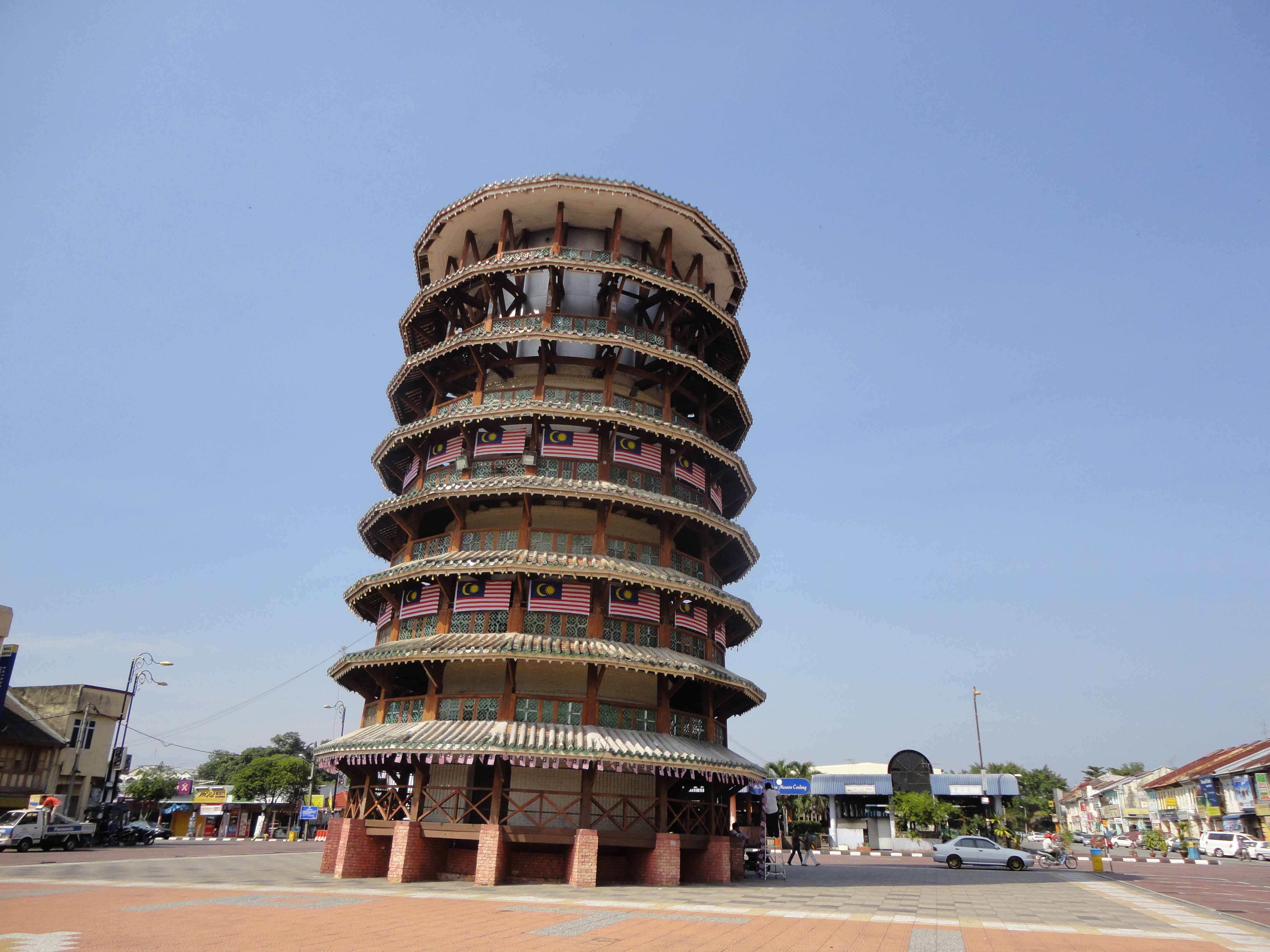 安順斜塔外觀